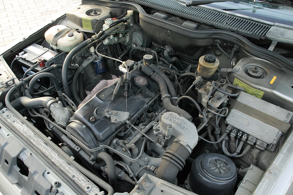 Renault 25 GTX 2.2l I4 petrol engine